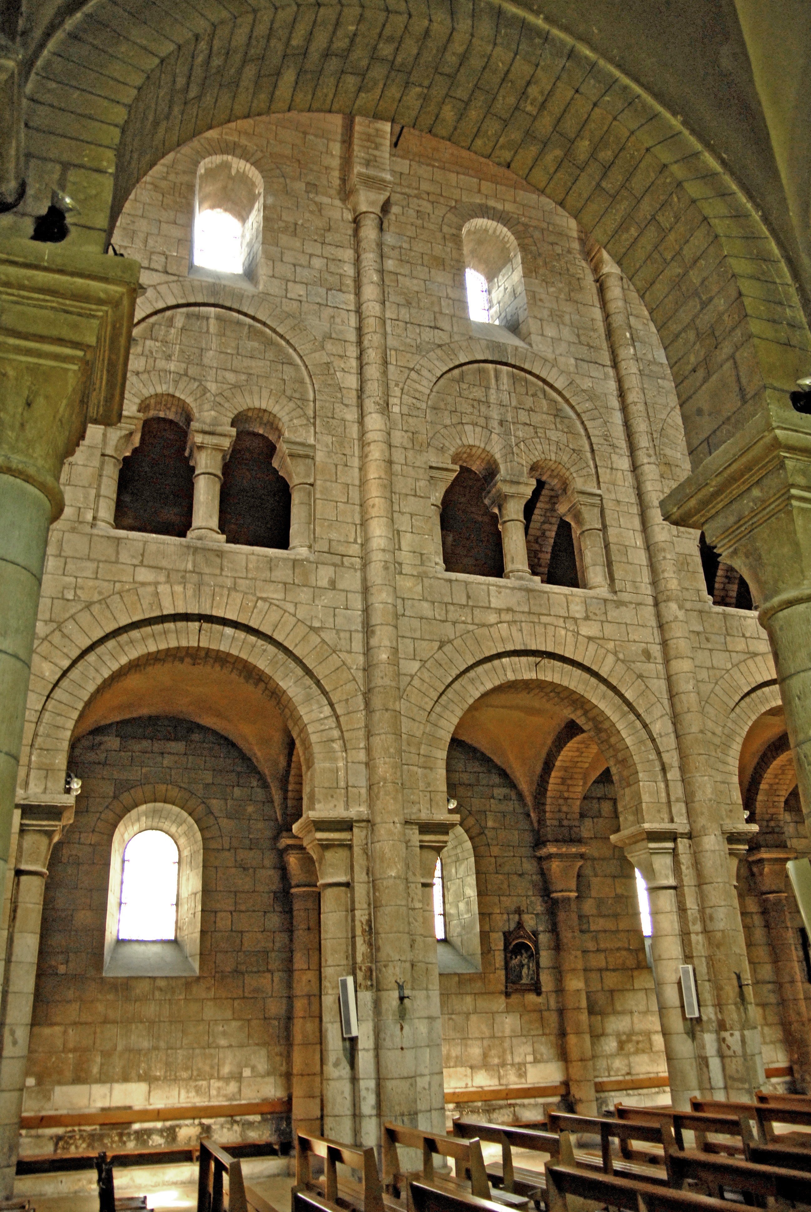 Saint-Etienne Nevers, Mittelschiff, die drei Geschosse